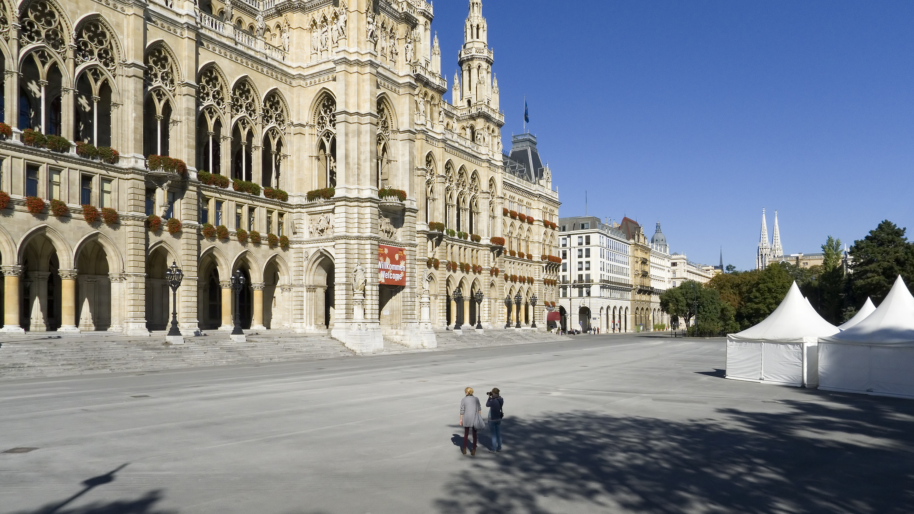 Rathausplatz in Wien 1 Richtung Nordwesten